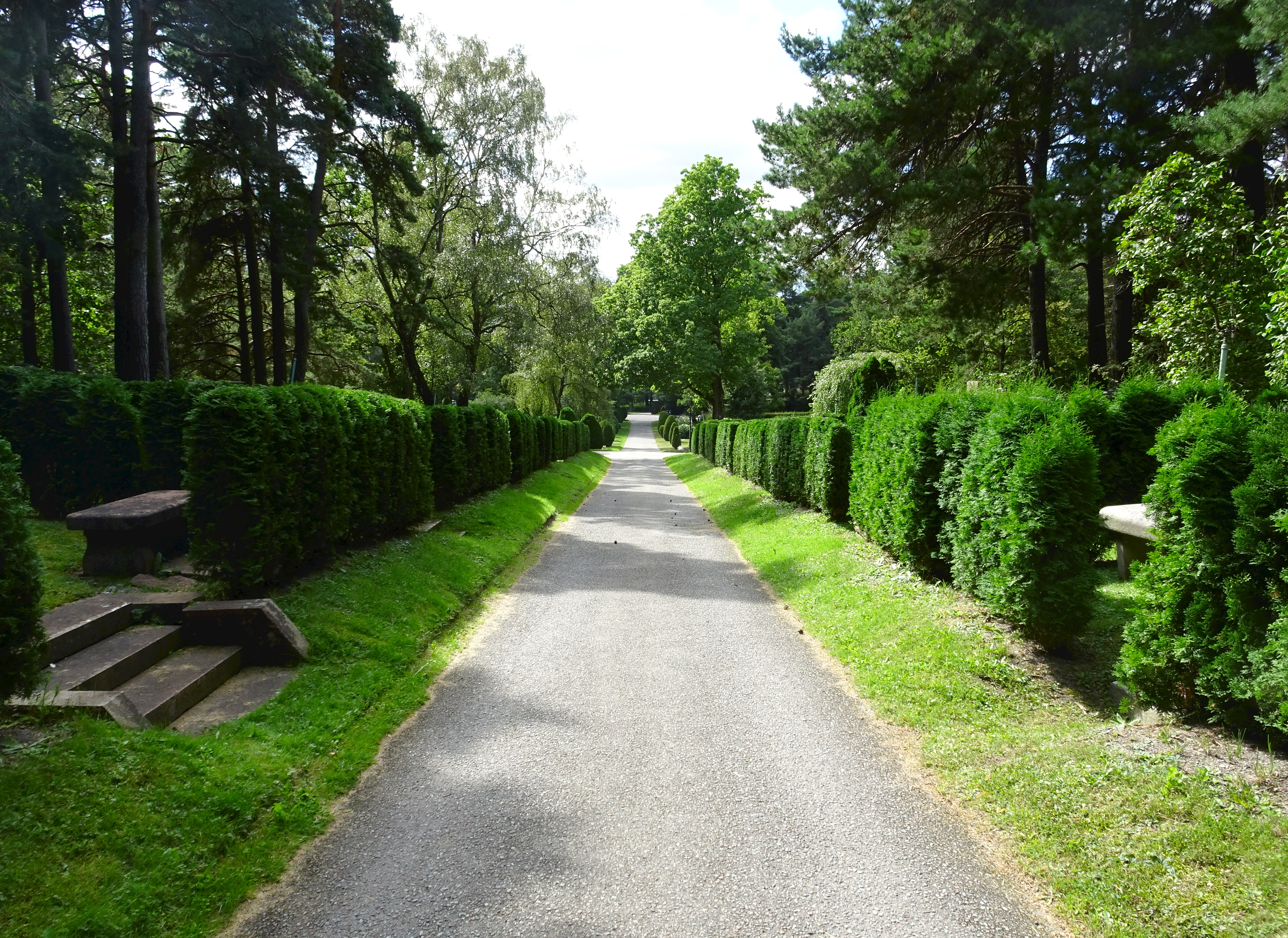 Norra Begravningsplatsen, Solglimtsväge